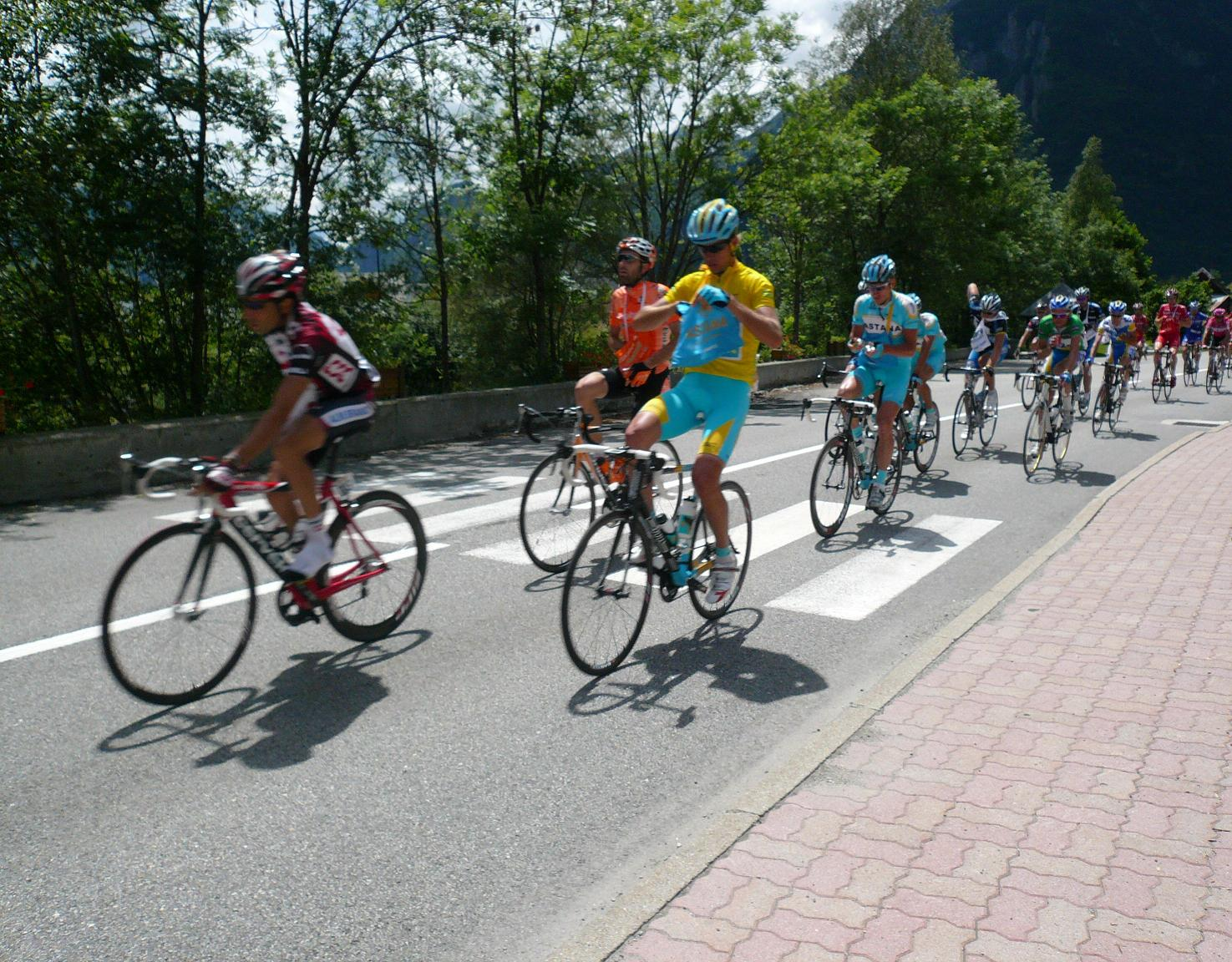 Peloton du Critérium du Dauphiné Liberé à Allemont (Etape Gap-Valloire) le 16 juin 2007. (Zone de ravitaillement)